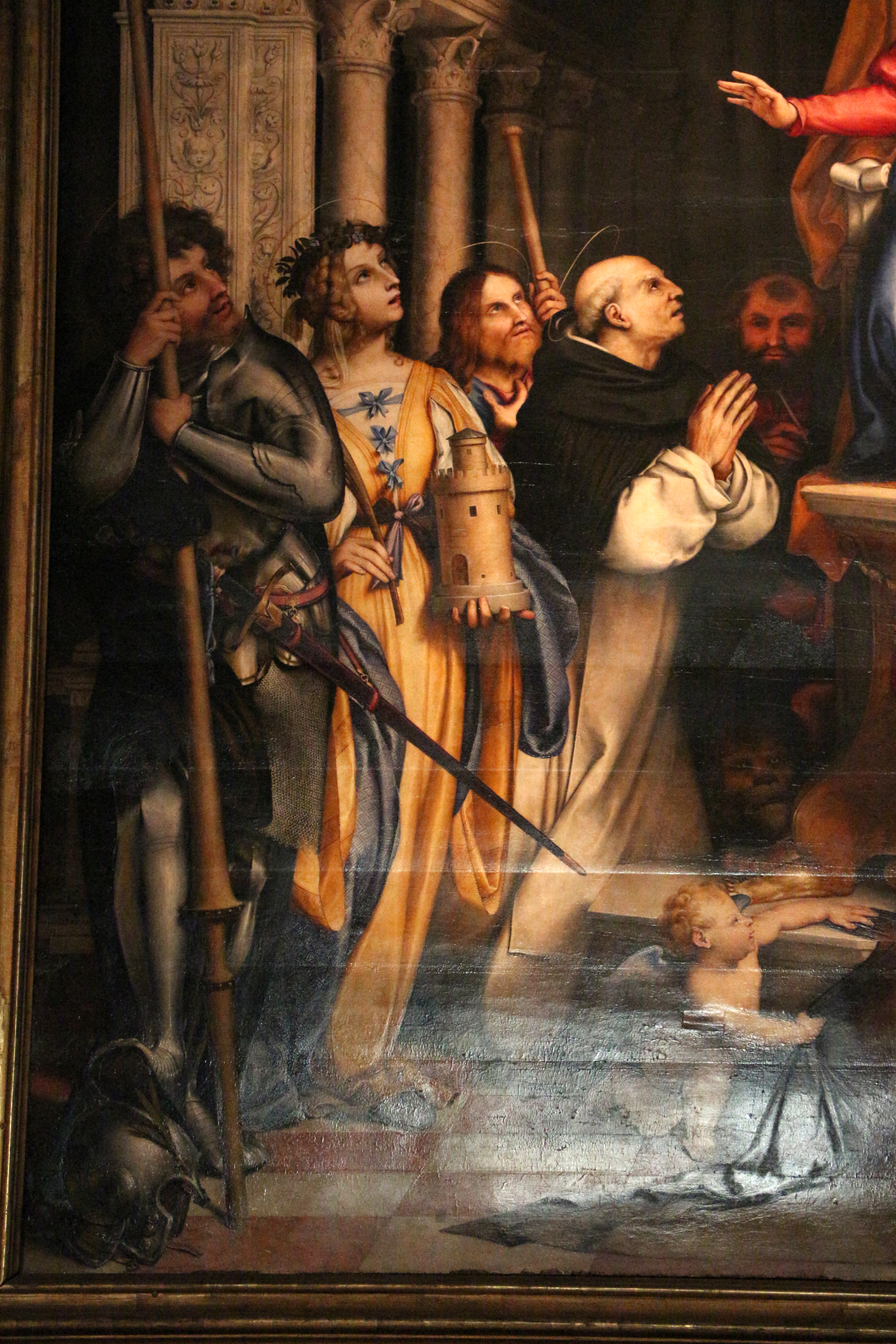 detail